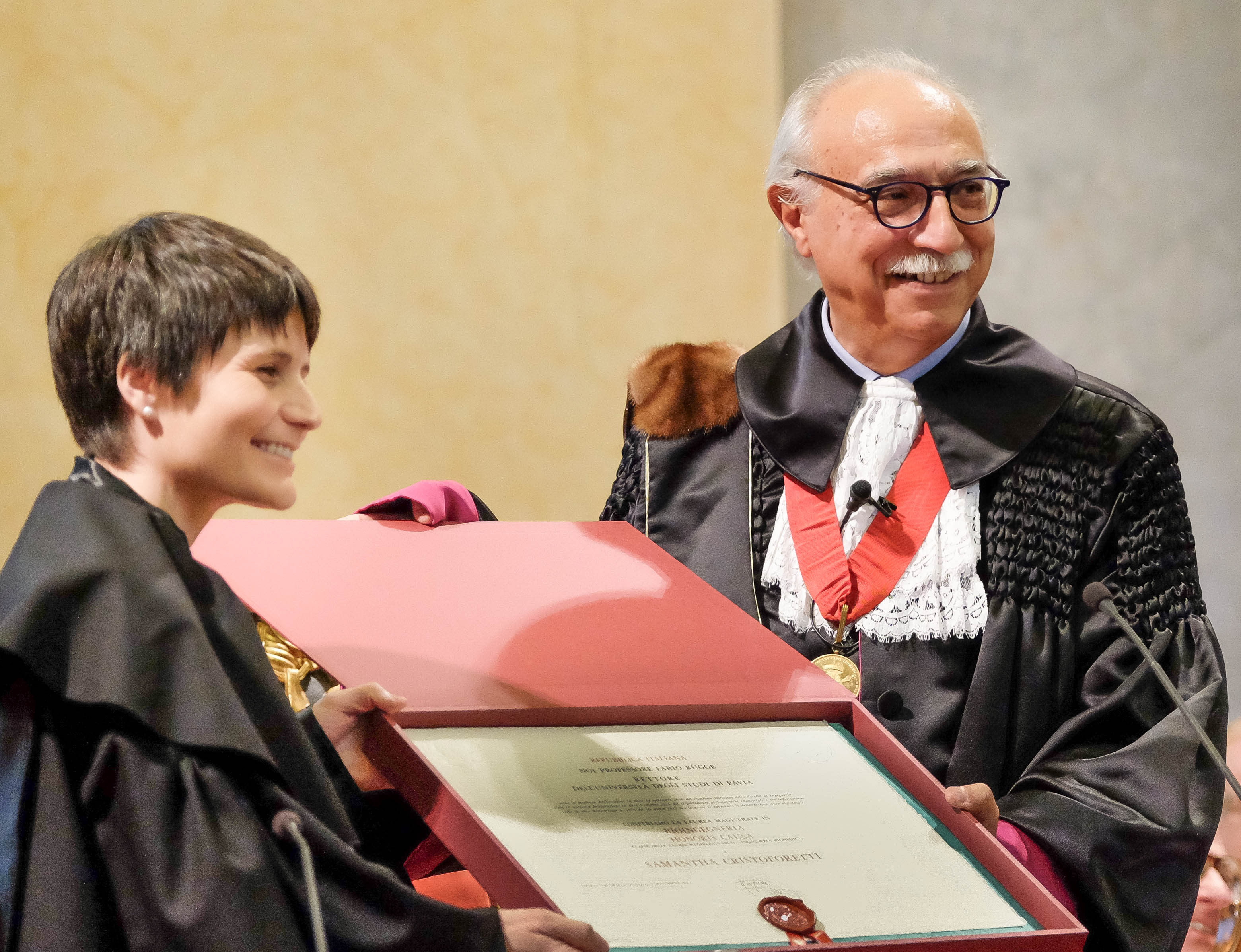 Il capitano dell’Aeronautica militare e astronauta ESA Samantha Cristoforetti ha ricevuto dall’Università di Pavia la laurea magistrale honoris causa in Bioingegneria. La cerimonia si è tenuta giovedì 9 novembre nell’Aula Magna dell’Ateneo pavese. «…La missione spaziale condotta dal Capitano Cristoforetti mostra come la bioingegneria sia una disciplina chiave per la definizione di metodologie e la realizzazione di tecnologie atte alla comprensione di fenomeni pato-fisiologici complessi, e alla valutazione degli effetti di nuove terapie farmacologiche. L’attività svolta in condizioni operative e ambientali fuori del comune dimostra in modo chiaro e circostanziato come le sue competenze tecnico/scientifiche siano di altissimo profilo…» Laureata a Monaco in ingegneria meccanica con una specializzazione in propulsione spaziale e strutture leggere, e con all’attivo numerosi altri studi, dall’aeronautica alla chimica, tra il novembre 2014 e il giugno 2015 ha trascorso 199 giorni sulla Stazione spaziale internazionale. A bordo della ISS, nell’ambito della missione ASI “Futura”, ha realizzato una serie di esperimenti scientifici tra cui il progetto “NATO” dell’Università di Pavia.